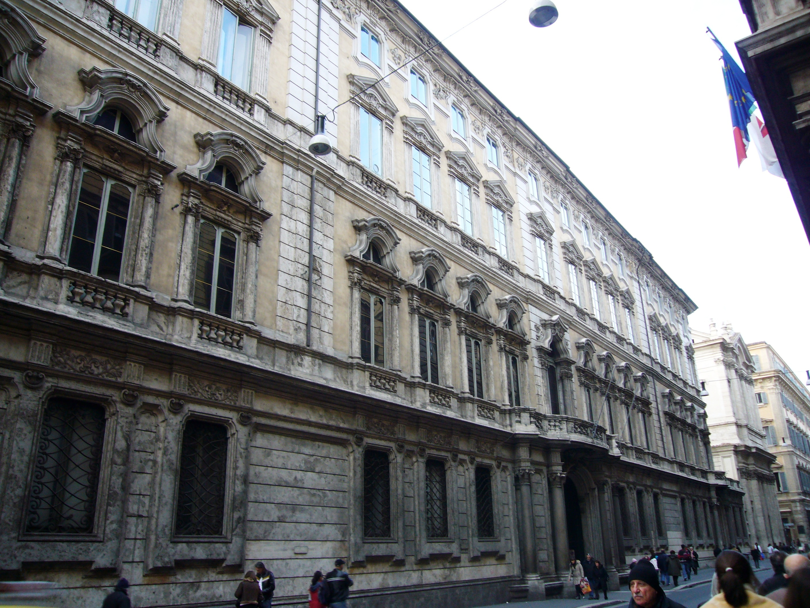 Roma, via del Corso, facciata di palazzo Doria-Pamphilij